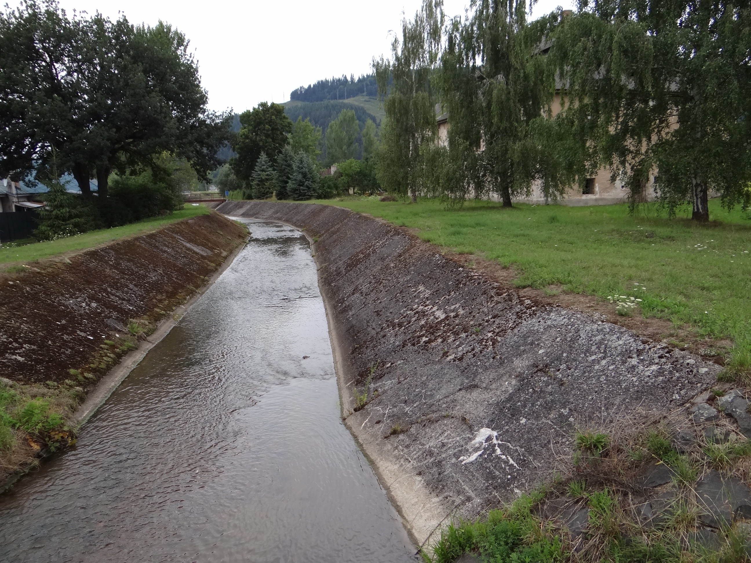 Kľačianka